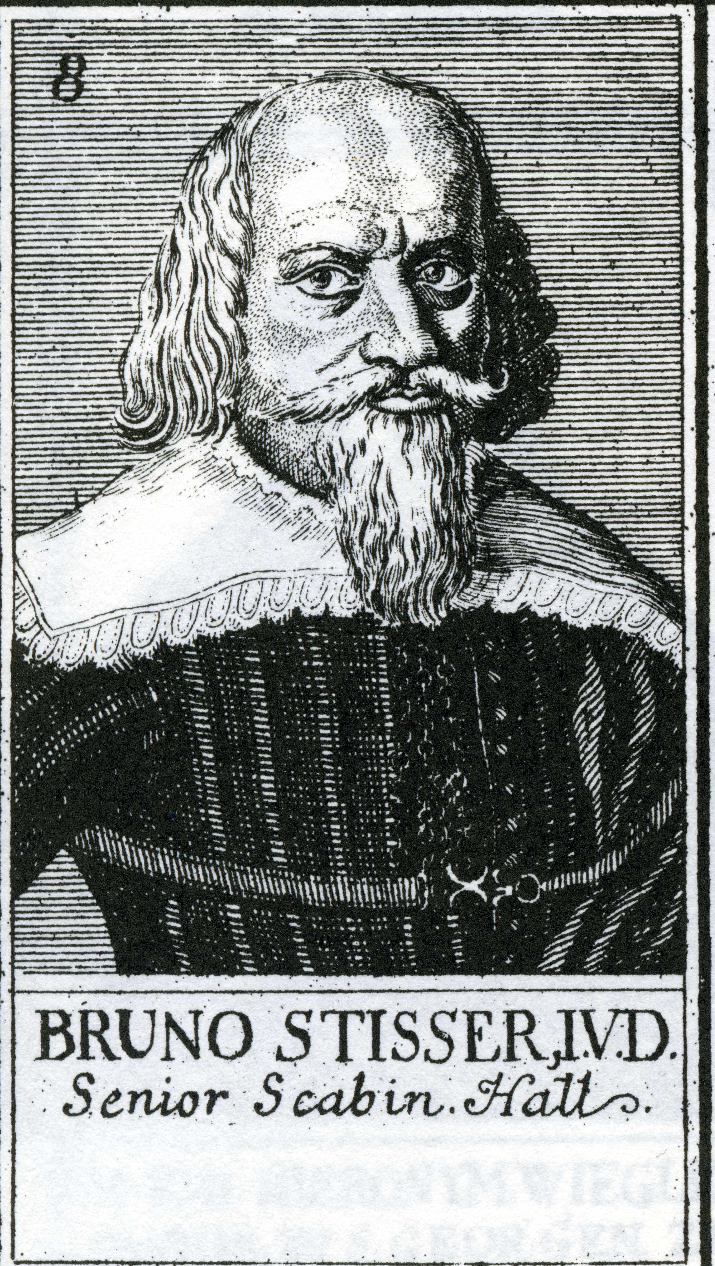 Bildnis Bruno Stisser (1592-1646)